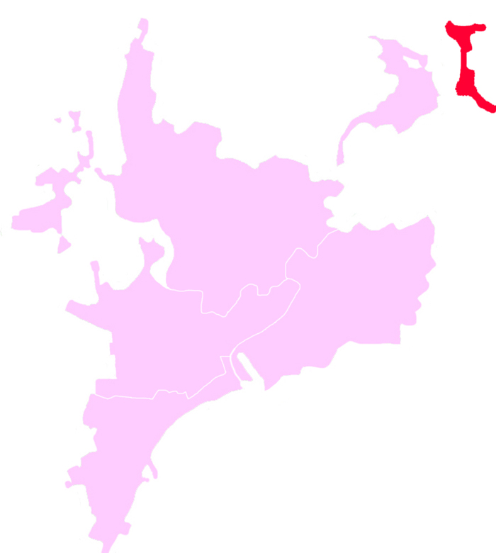 Talakovka (Mariupol, Ukraine)